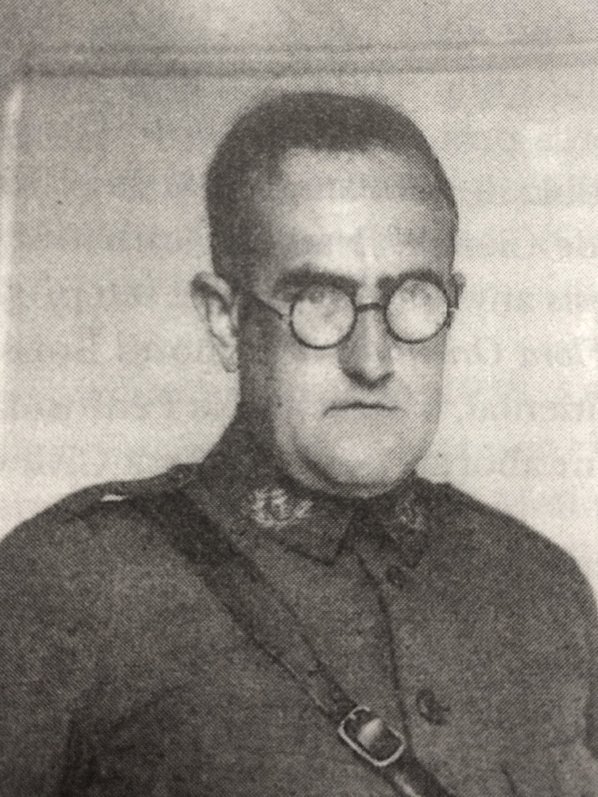 Pius Font i Quer (Lleida, 9 d'abril de 1888 – Barcelona, 2 de gener de 1964) fou un botànic (taxonomista i fitogeògraf), farmacèutic i químic català.